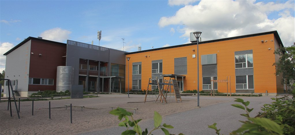 Jokivarren koulun Nikinmäen opetuspiste Vantaan Nikinmäen kaupunginosassa.